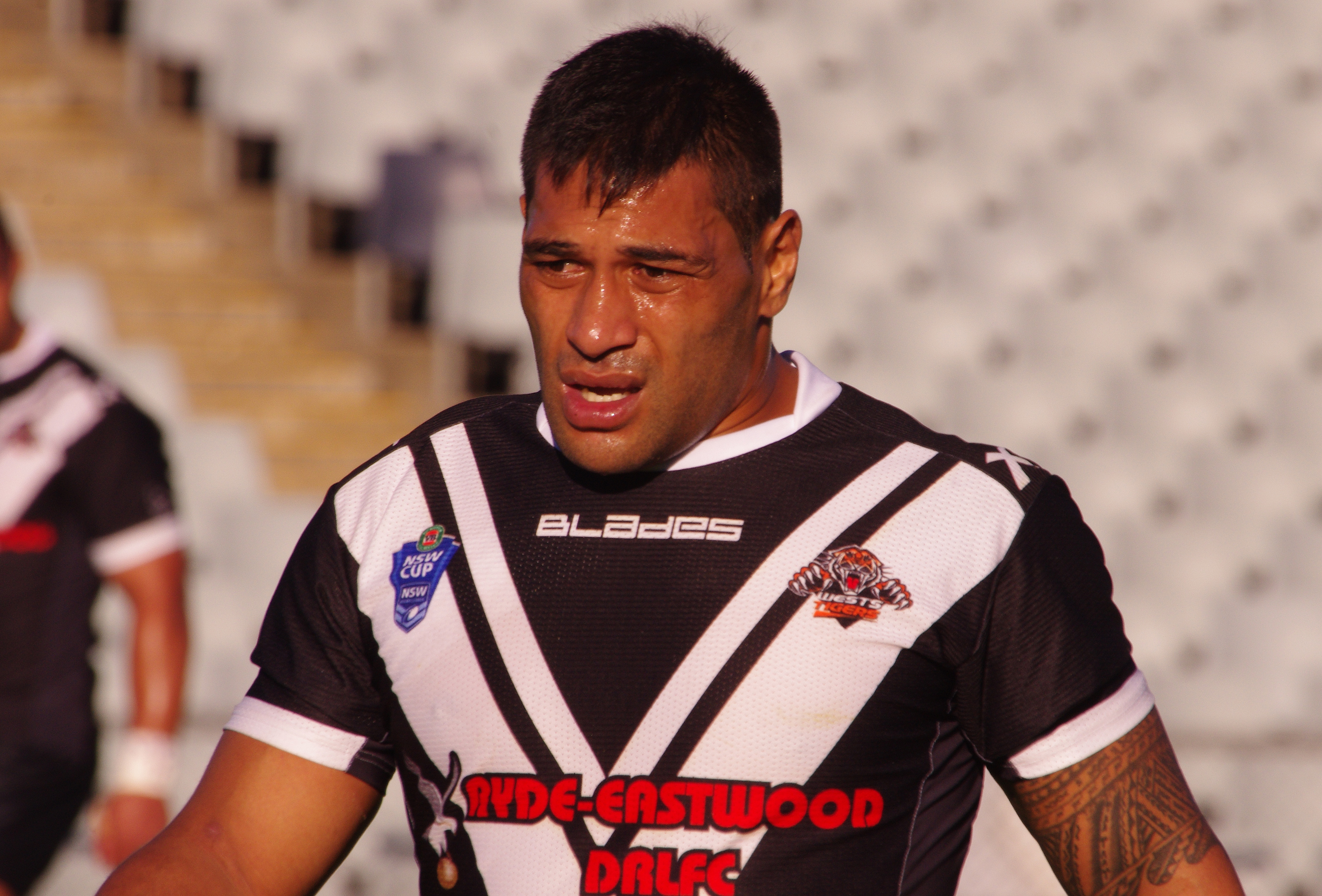 MATT UTAI